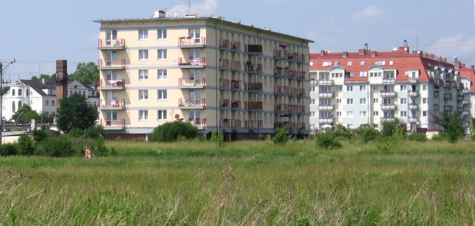 Wrocław, Poland - settlement Poświętne